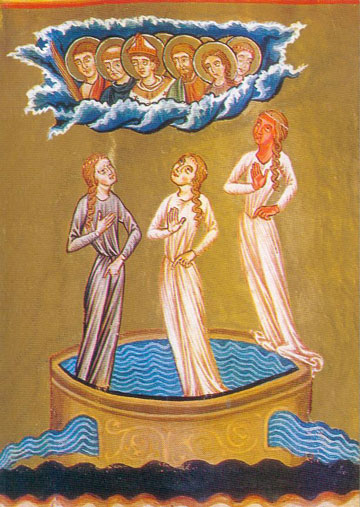 Der Brunnen des lebens, Liber divinorum operum